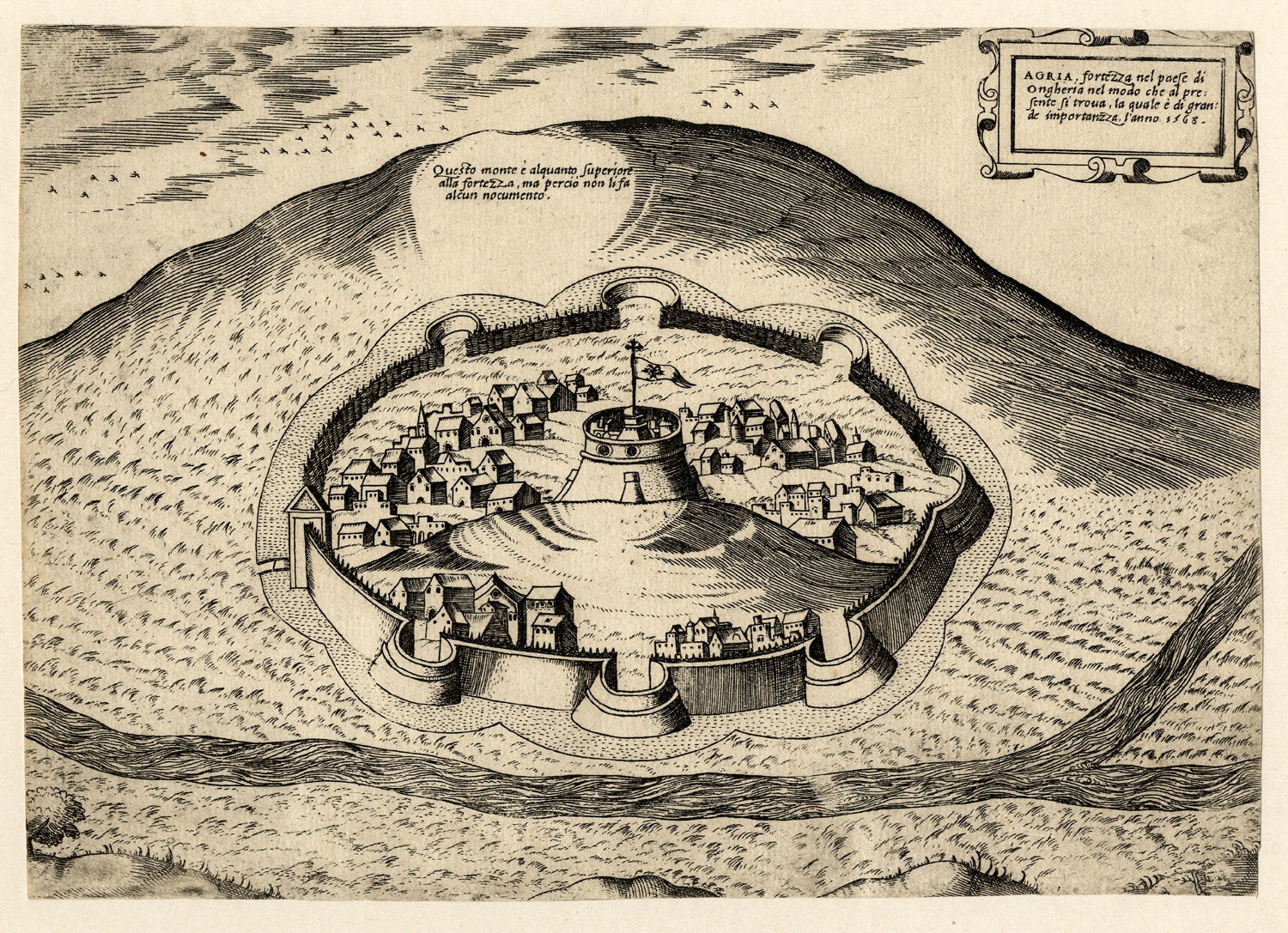 Ansicht von Erlau; Radierung, nach 1568